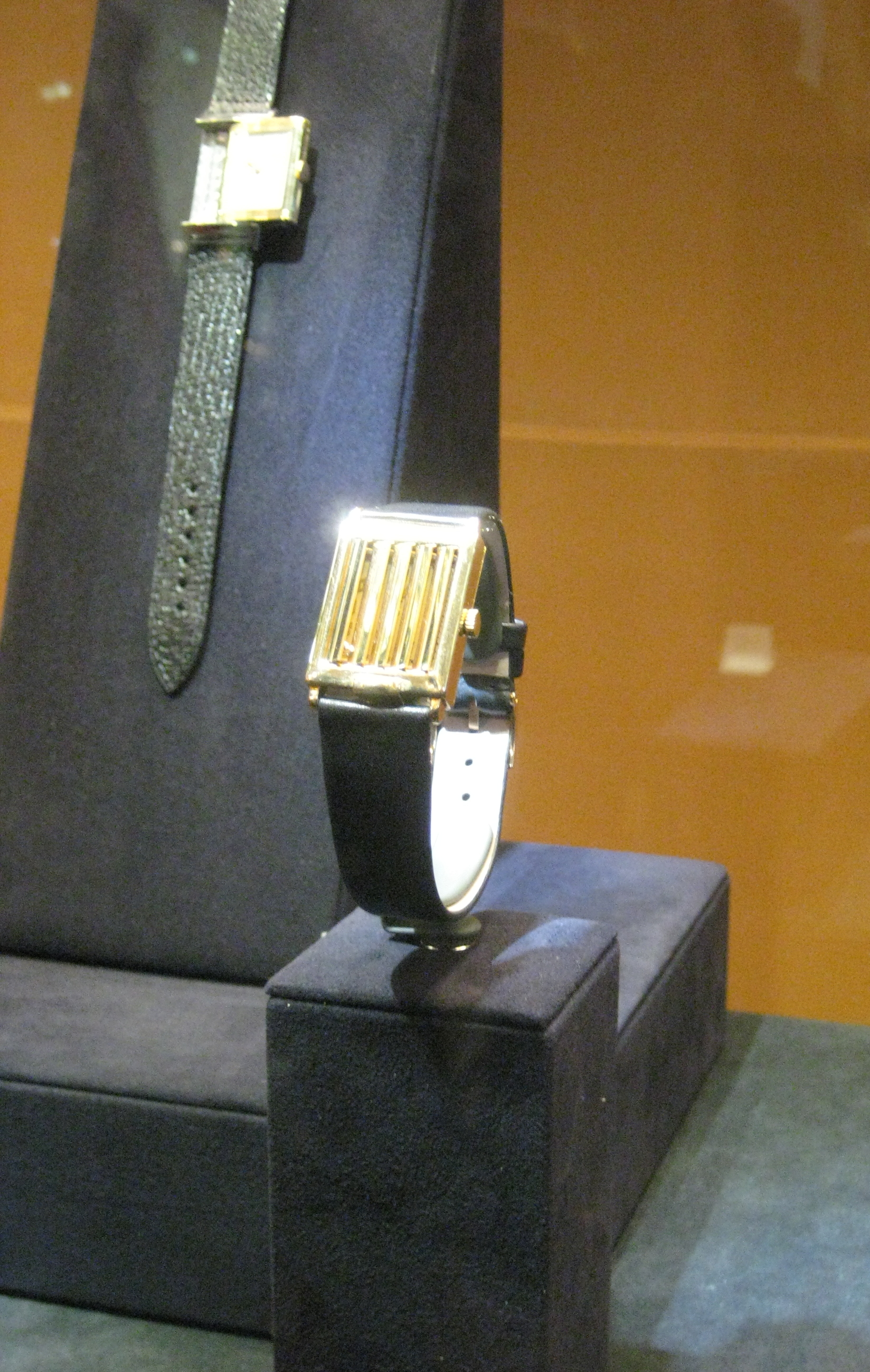 Наручные часы с циферблатом, закрытым жалюзи. Vacheron Constantin, 1929/ Желтое золото. Vacheron Constantin Patrimoine